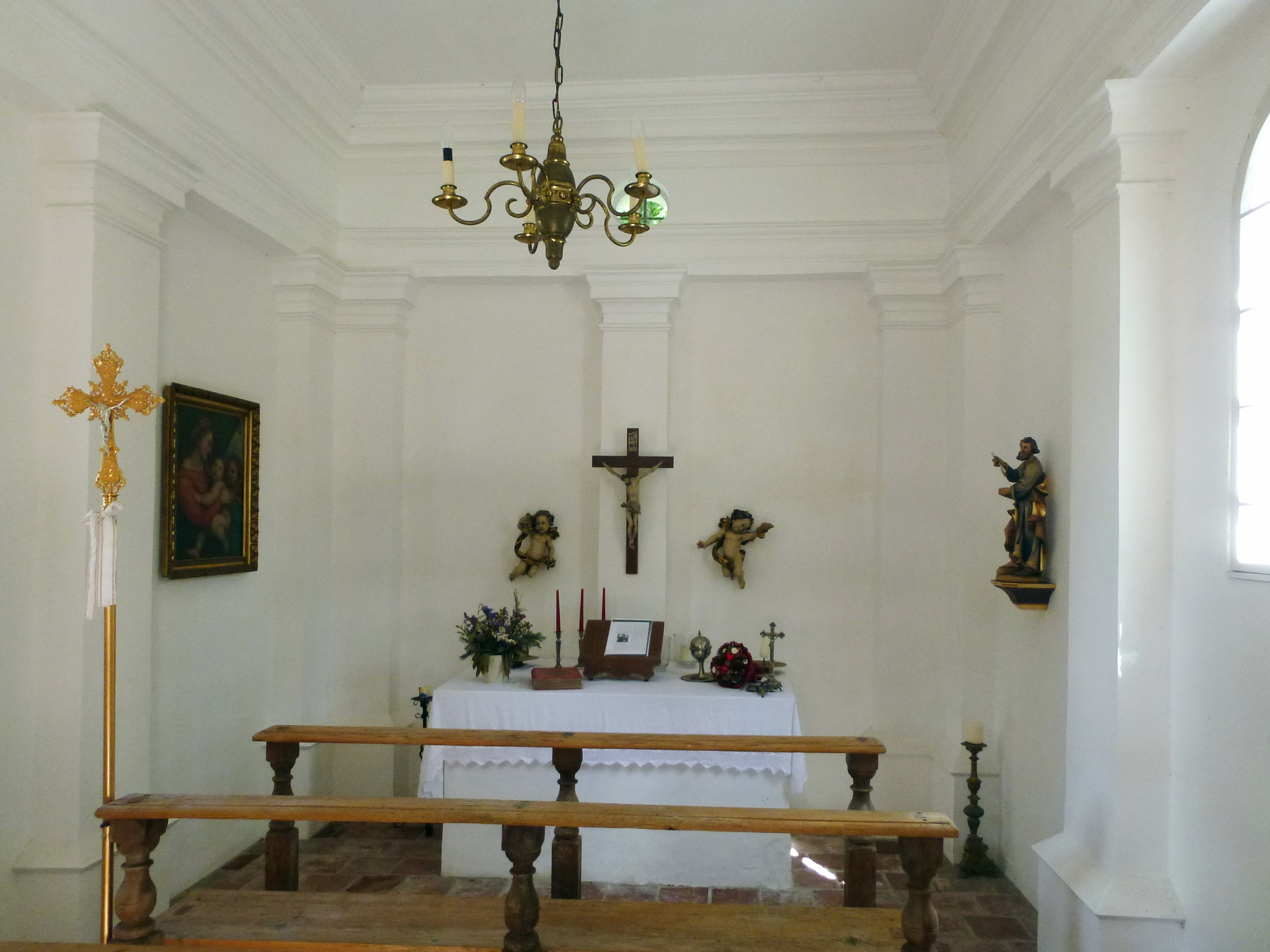 Germering - Ortsteil Wandelheim, Wandelheim 1, Hofkapelle St. Petrus: Innenansicht